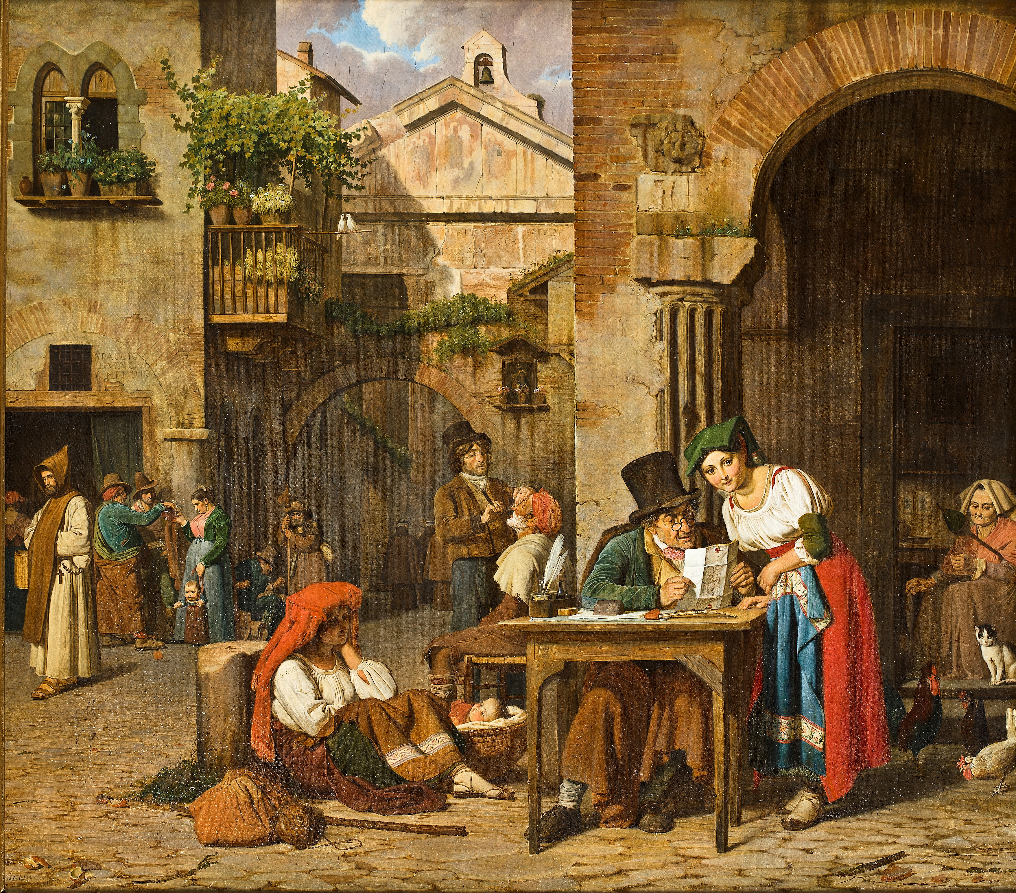 En romersk gadeskriver læser et brev for en ung pige